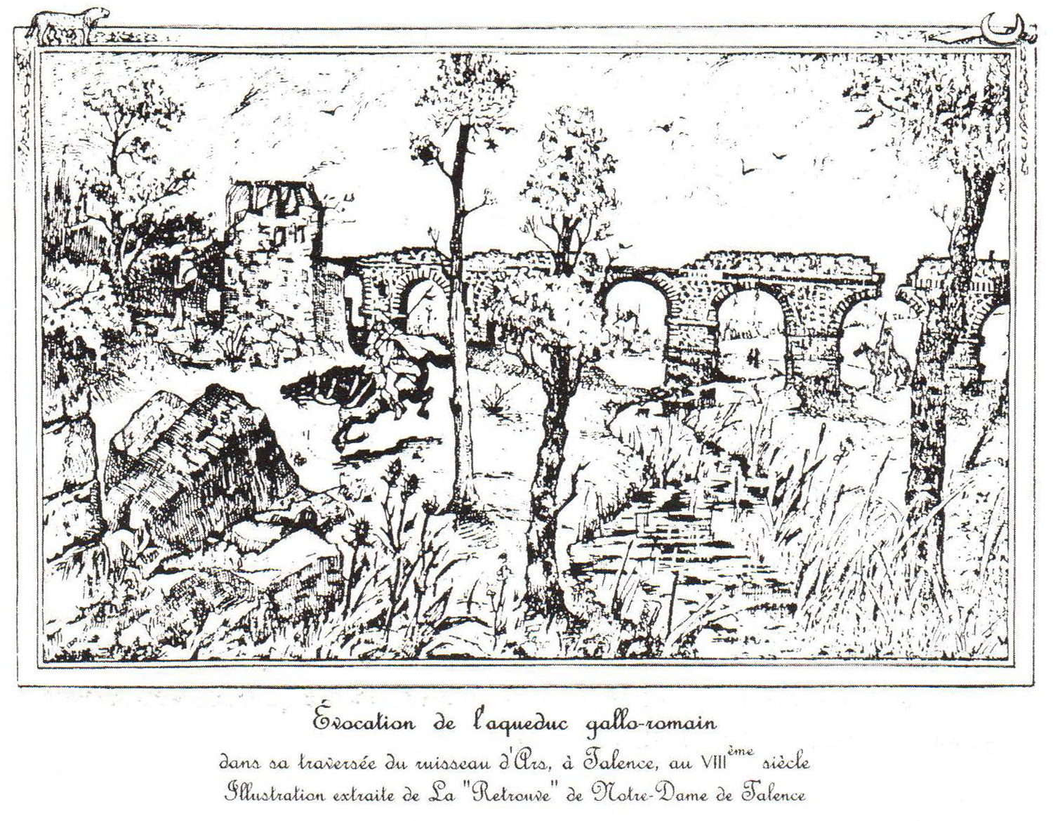 L'aqueduc gallo-romain alimentait bordeaux en eau provenant du ruisseau de l'Eau Blanche et suivait le tracé de la route de Toulouse actuelle